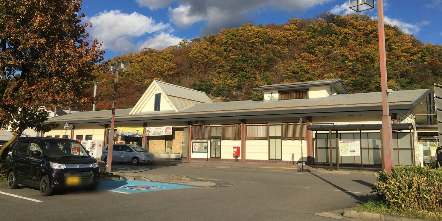 屋代駅入口